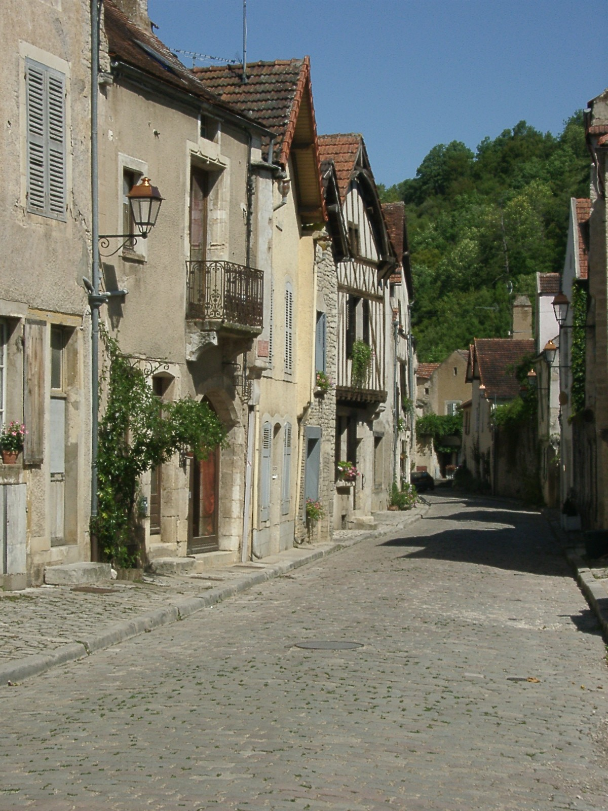 Noyers-sur-Serein : rue Franche -août 2006 -photo personnelle -Henri JACHET